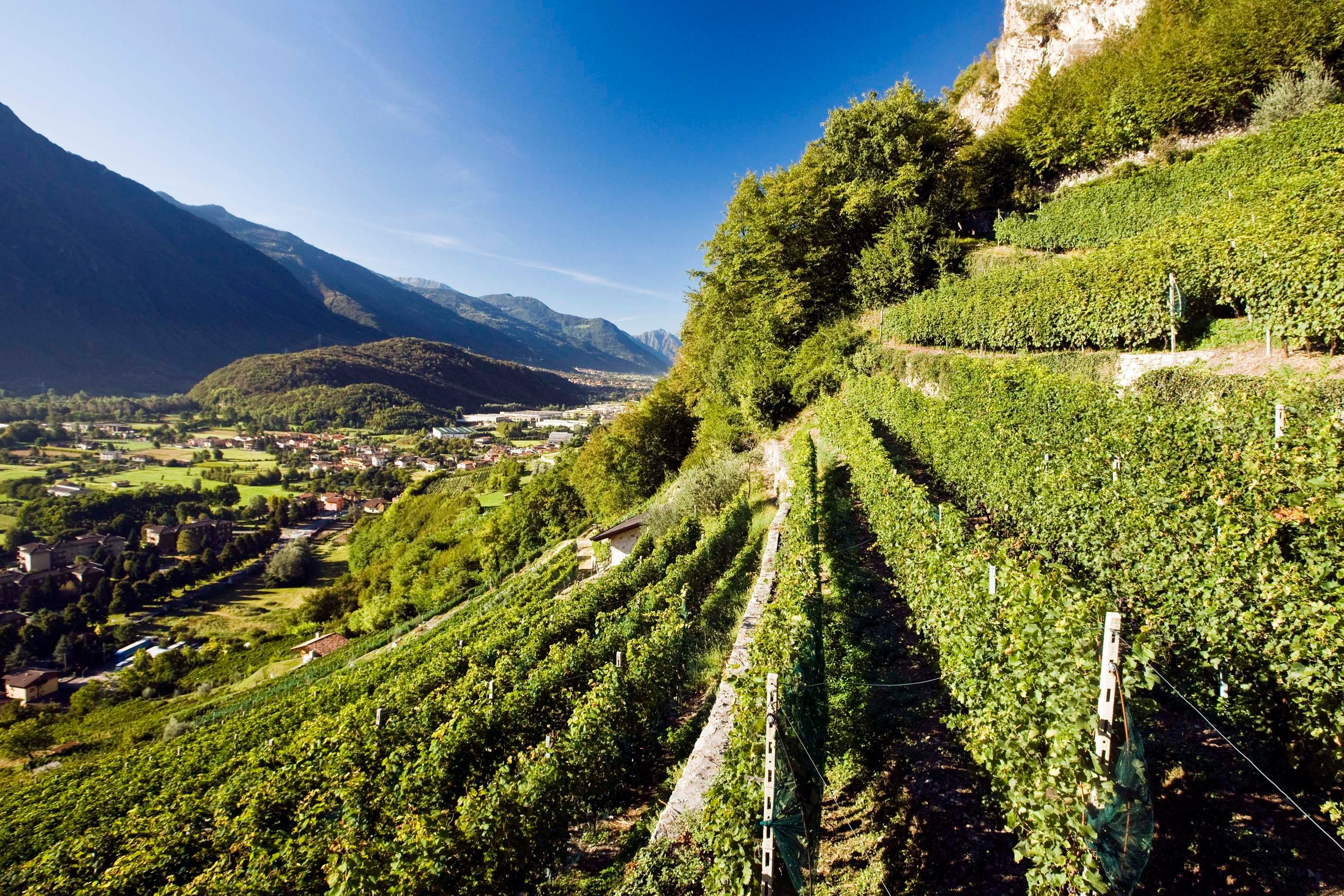 Suggestivo scorcio sui vigneti terrazzati della Valcamonica lungo la Via Volte a Piamborno da cui hanno origine i cultivar delle volte